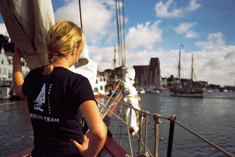 Ablegemannöver der Meeresschutzaktion Habitat Mare der NAJU vor Kappeln.